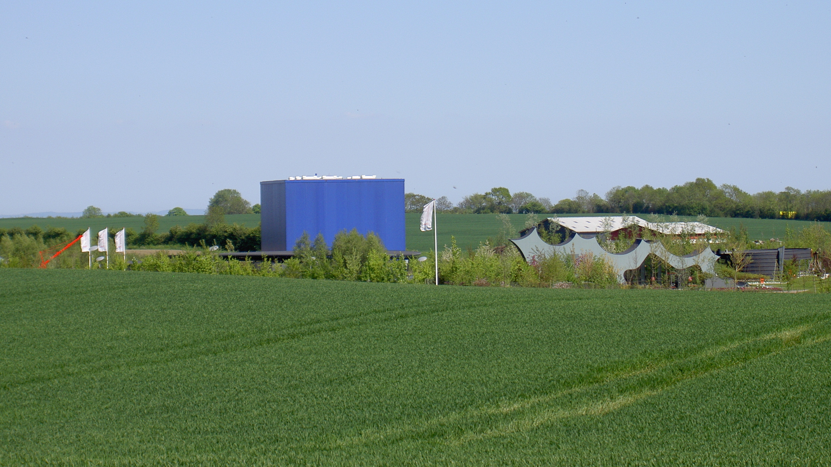 Danfoss Universe, Nordborg